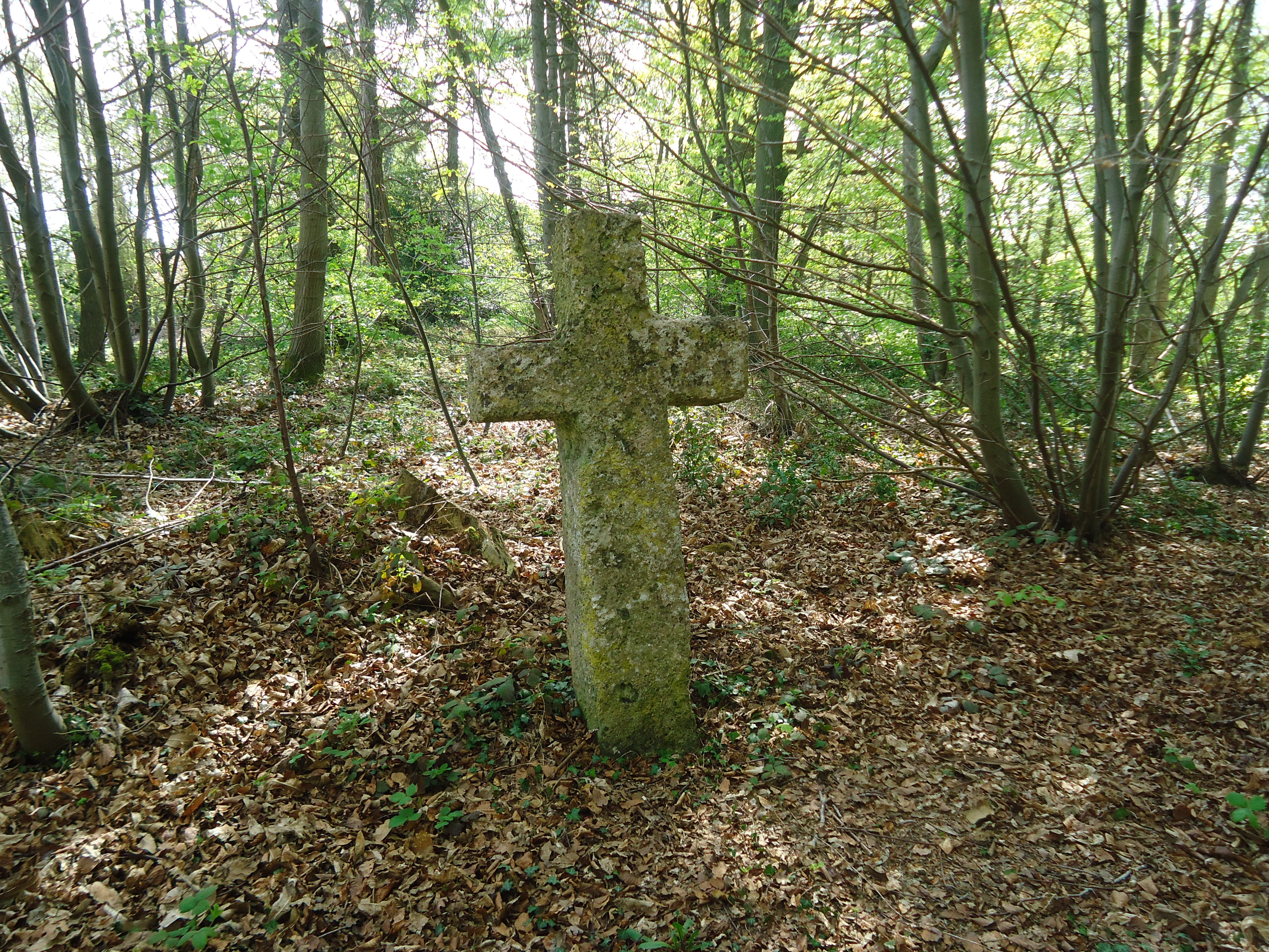 Menhir christianisé de la Croix aux Chiens à Saint-Pierre-du-Val dans l'Eure